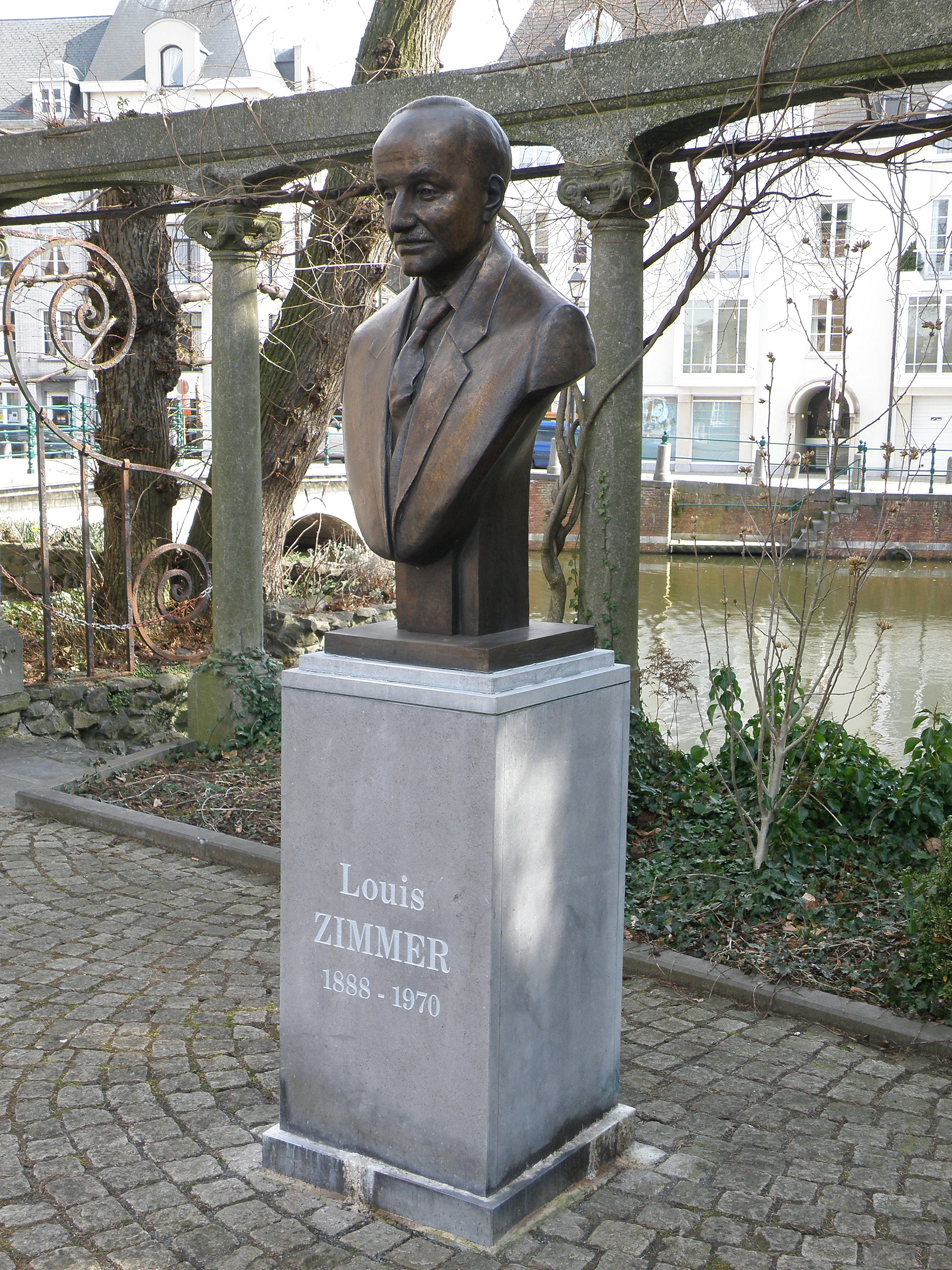 Standbeeld Louis Zimmer nabij Zimmertoren te Lier.